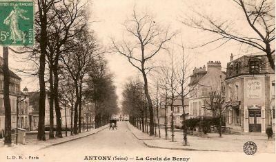 Antony : carte postale (La Croix de Berny en 1912)